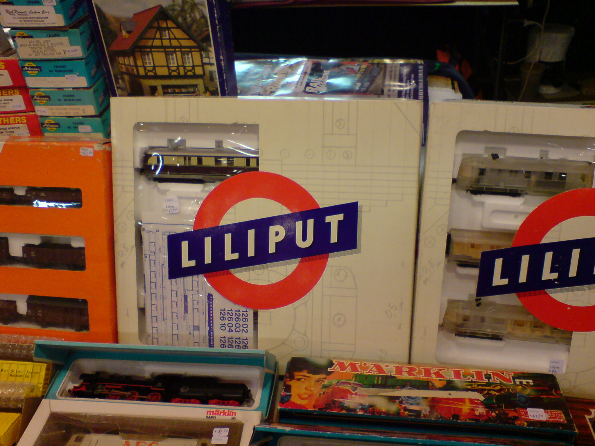 Nederlandse Modelspoordagen / Taken by Rick G and in my London Underground Tube Diary